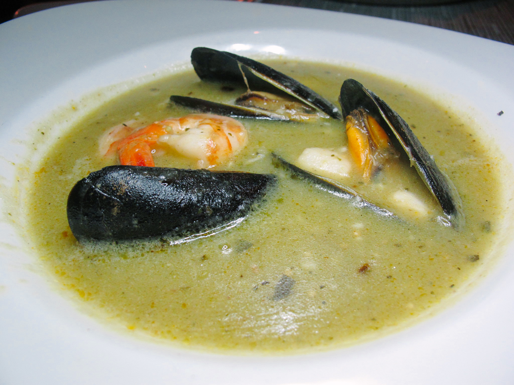 Huatape de camarón y mejillones en un restaurante de Dallas, Texas, USA.